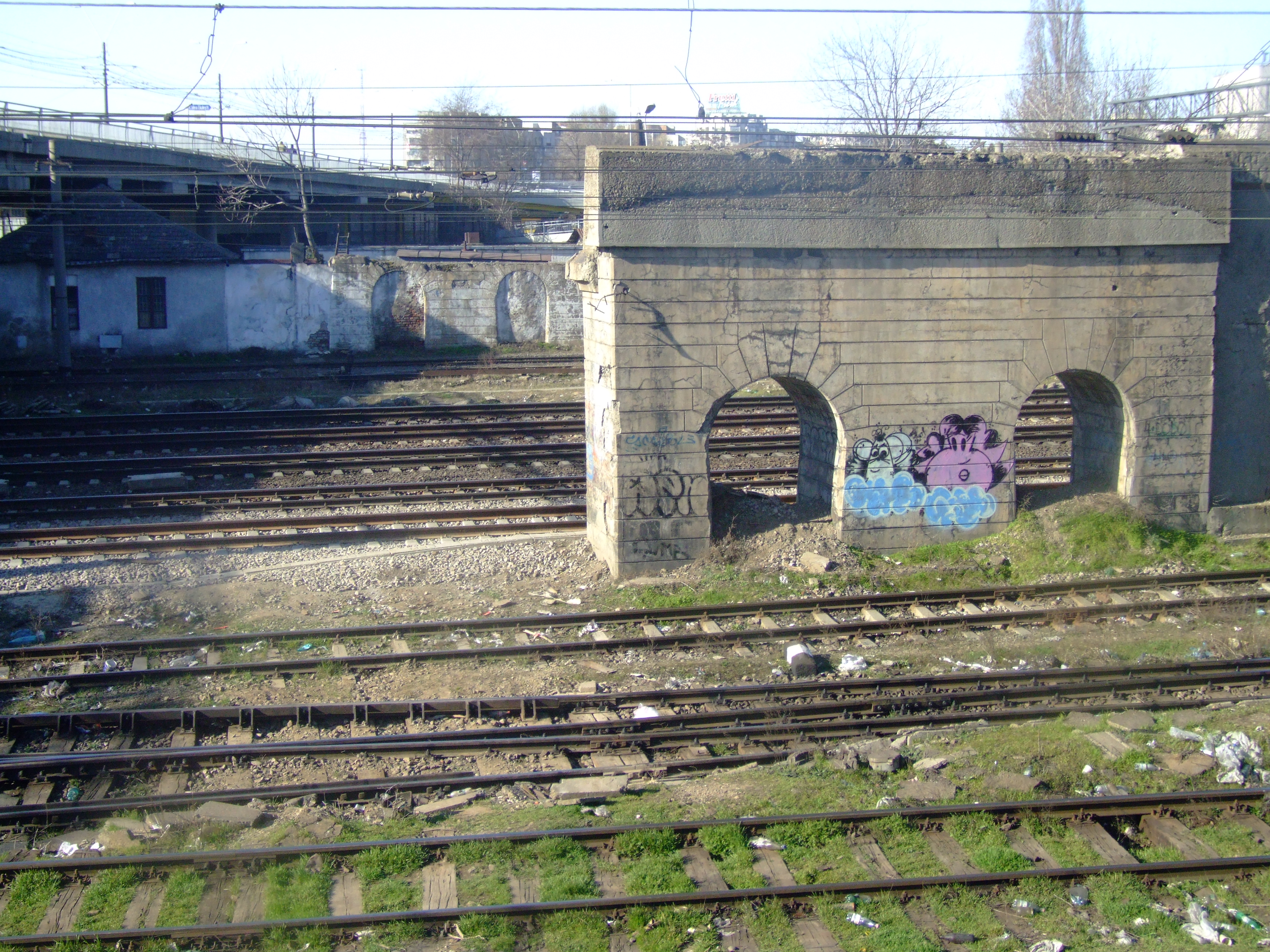 Podul Grant Bucuresti